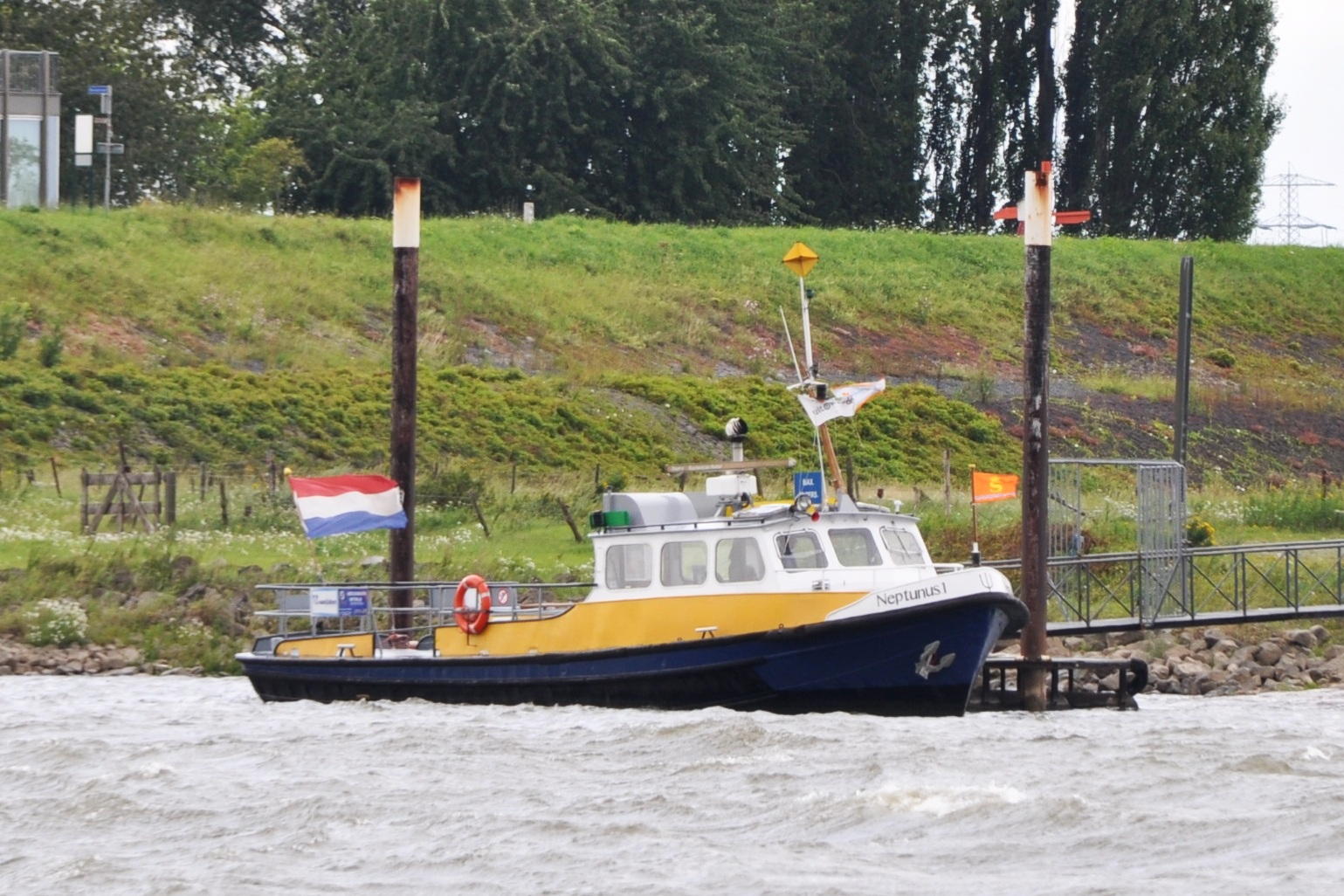 De NEPTUNUS 1, het voetveer Heerewaarden - Varik over de Waal